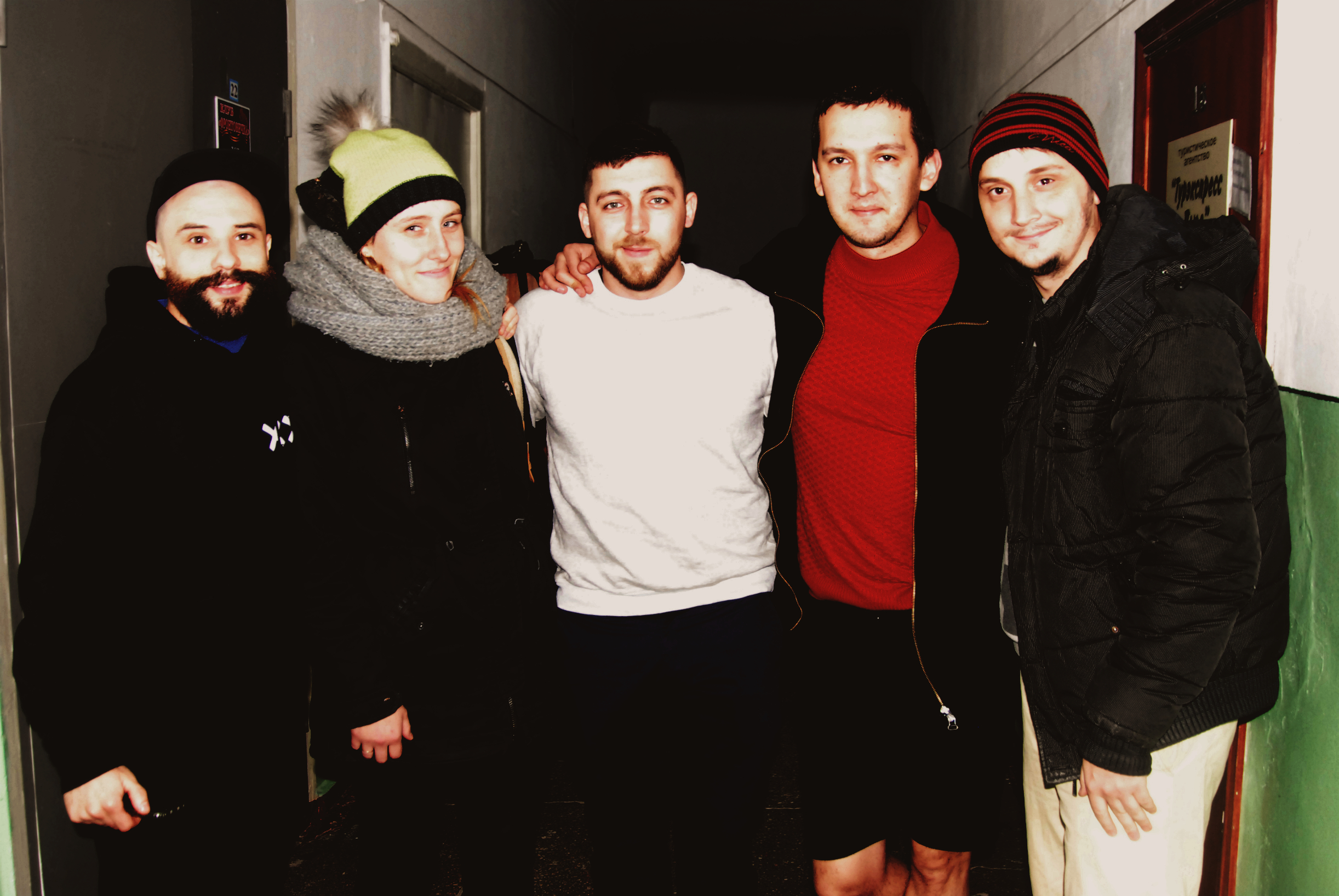 Мелитополь